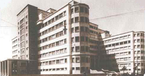 Hospital Argerich en 1951